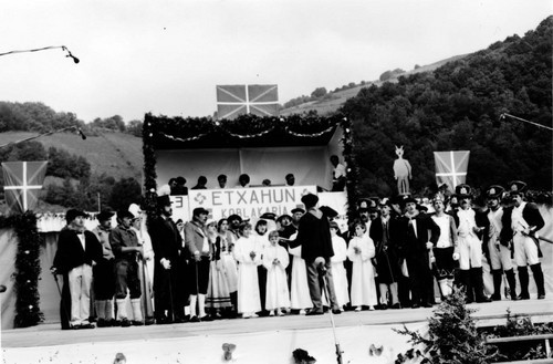 Etxahun koblakari pastorala. 1986. Barkoxe